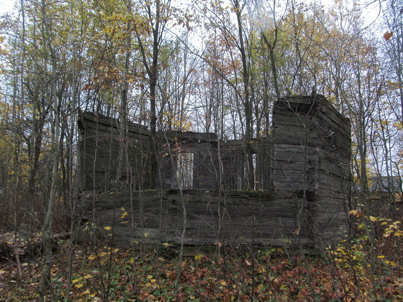 Бярозаўка. Васьмікутная драўляная капліца